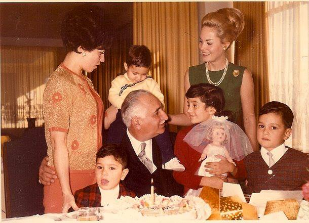 حبیب الله ثابت به همراه خانواده